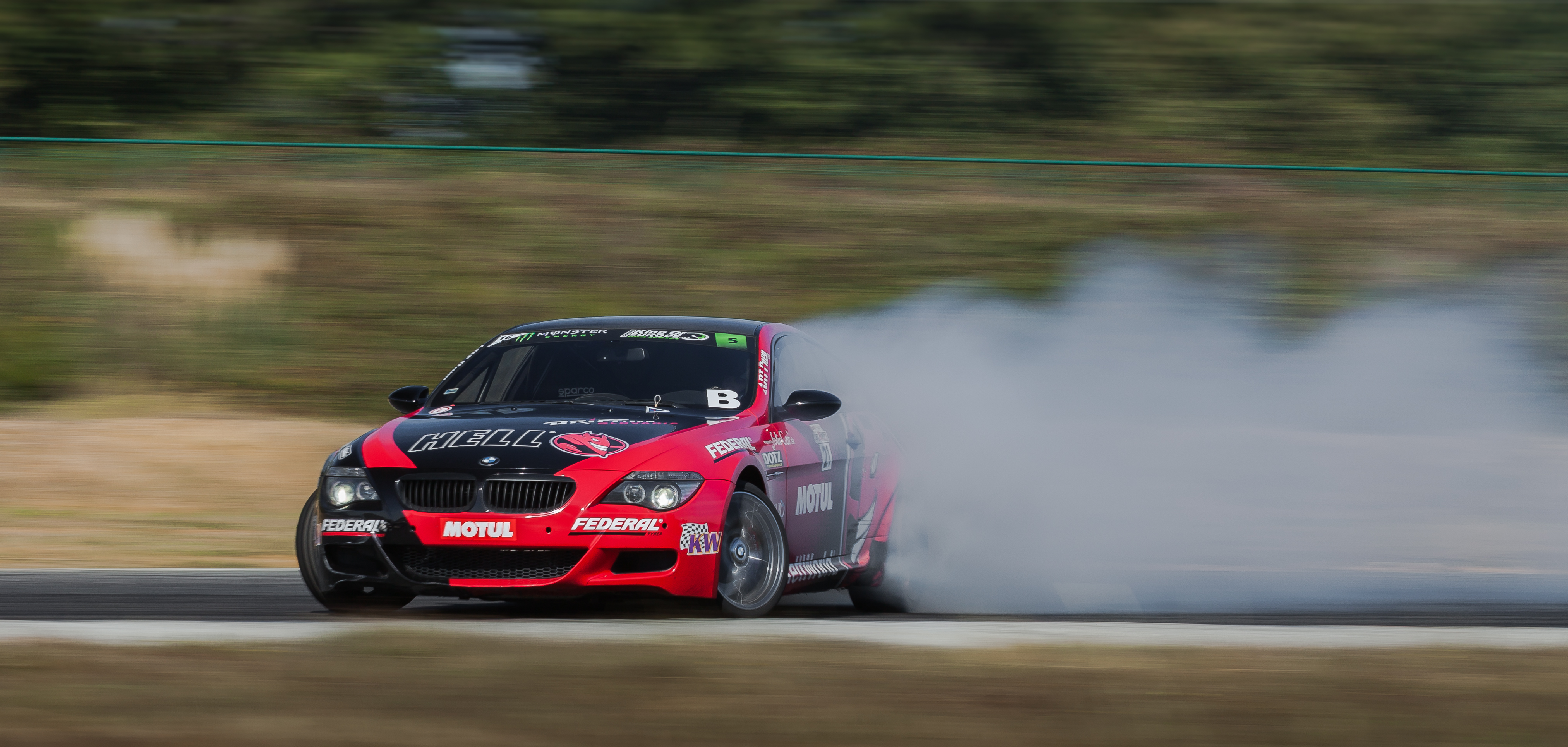 Championnat Européen de DRIFT - Bordeaux Mérignac Gironde 13 et 14 septembre 2014 - BMW M6